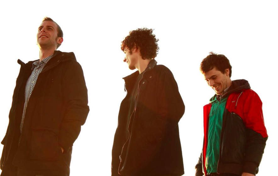 Lasers - Banda / Grupo de música electrónica